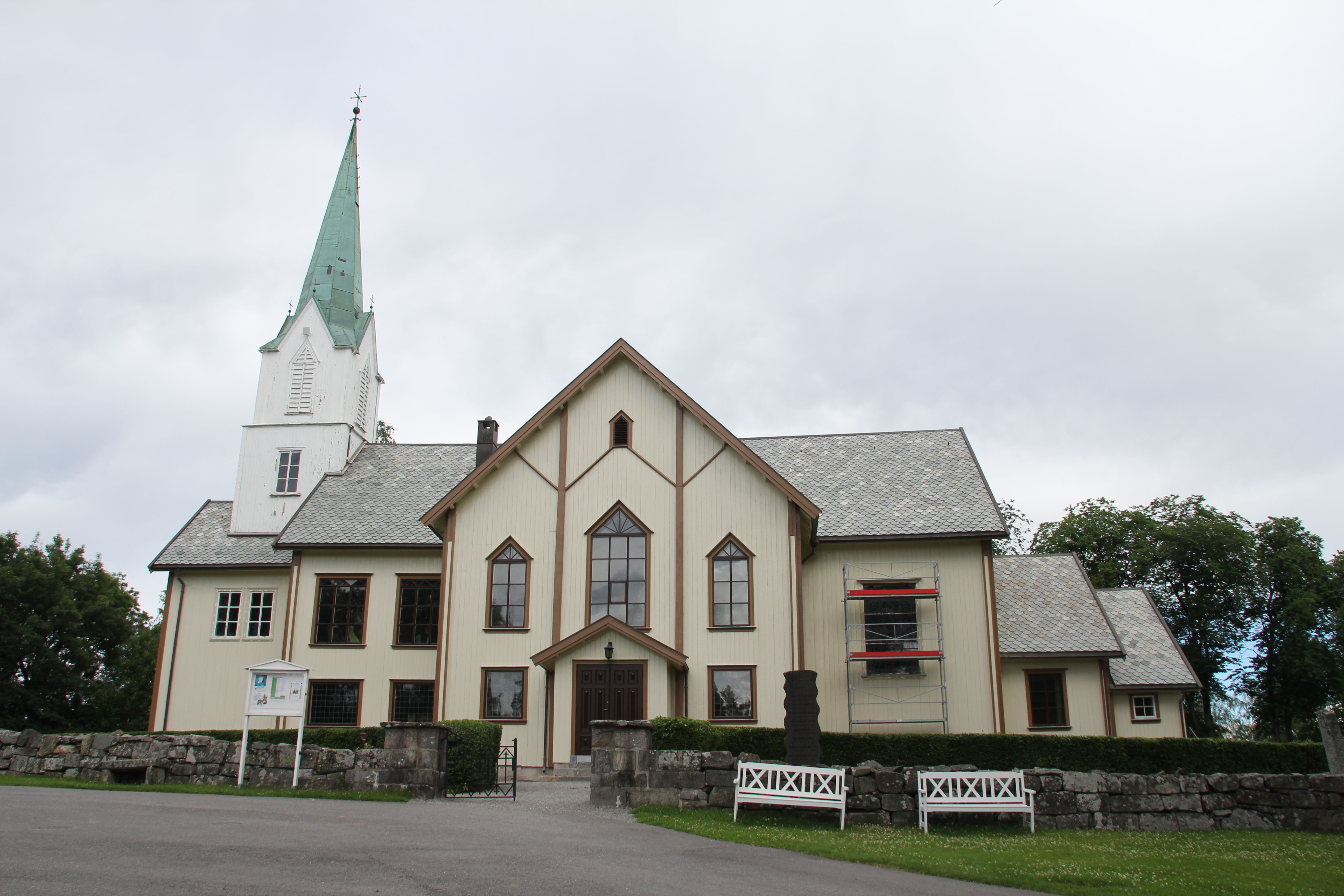 Askim kirke er sognekirke for Askim, og er en tømmerkirke fra 1878.